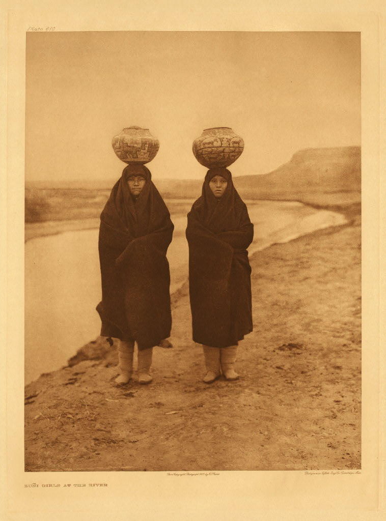 Vodonoše.